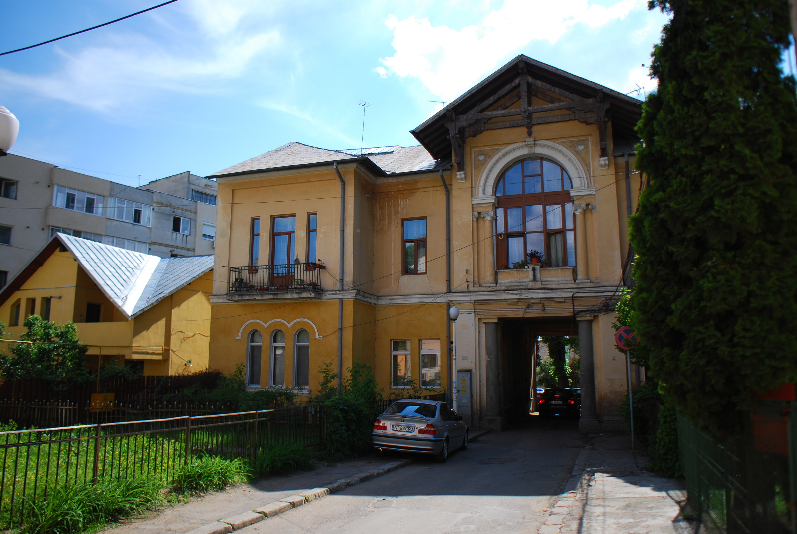 Casă cu trecere